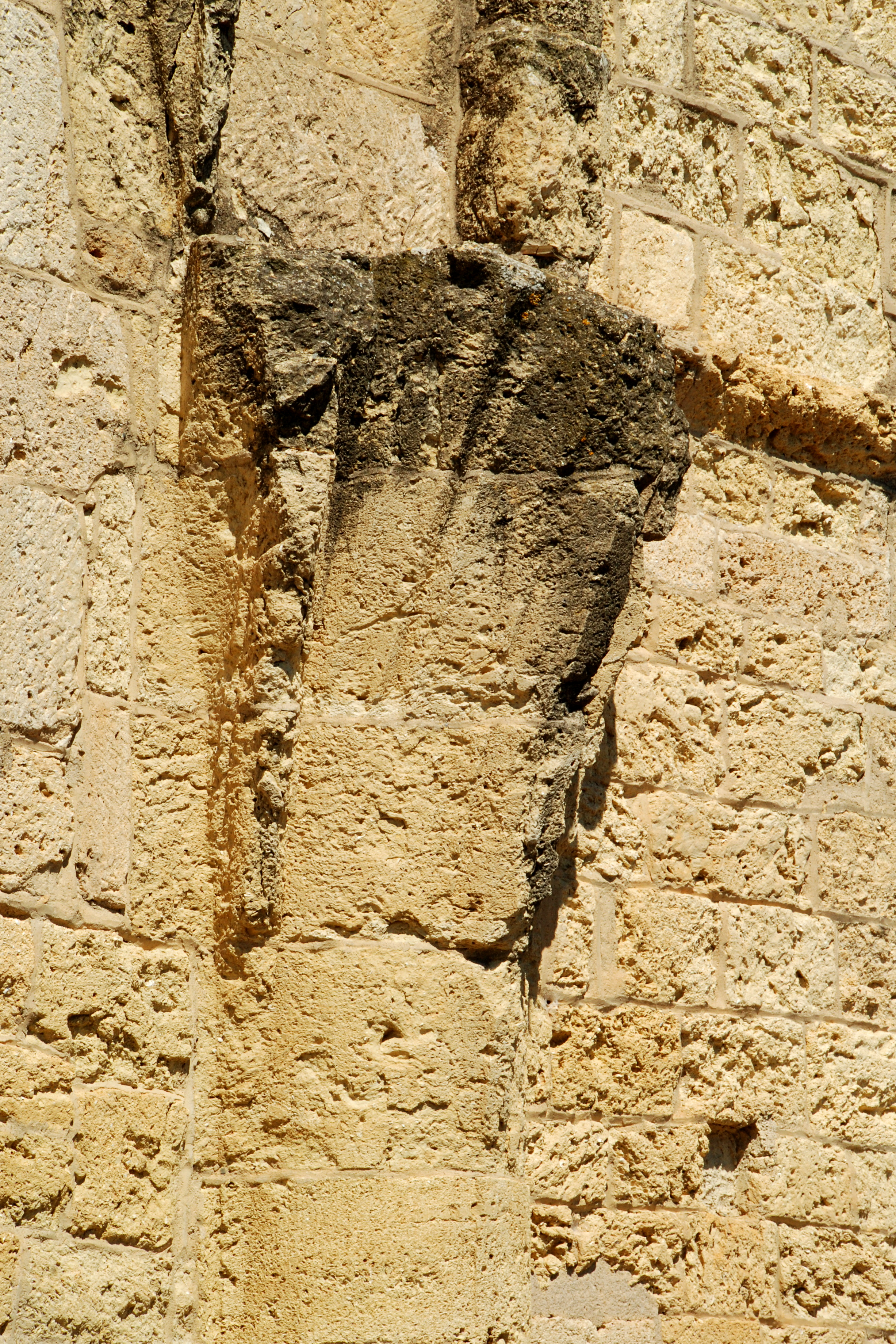 France - Languedoc - Hérault - Puissalicon - ancienne église Saint-Étienne-de-Pézan - tour romane .